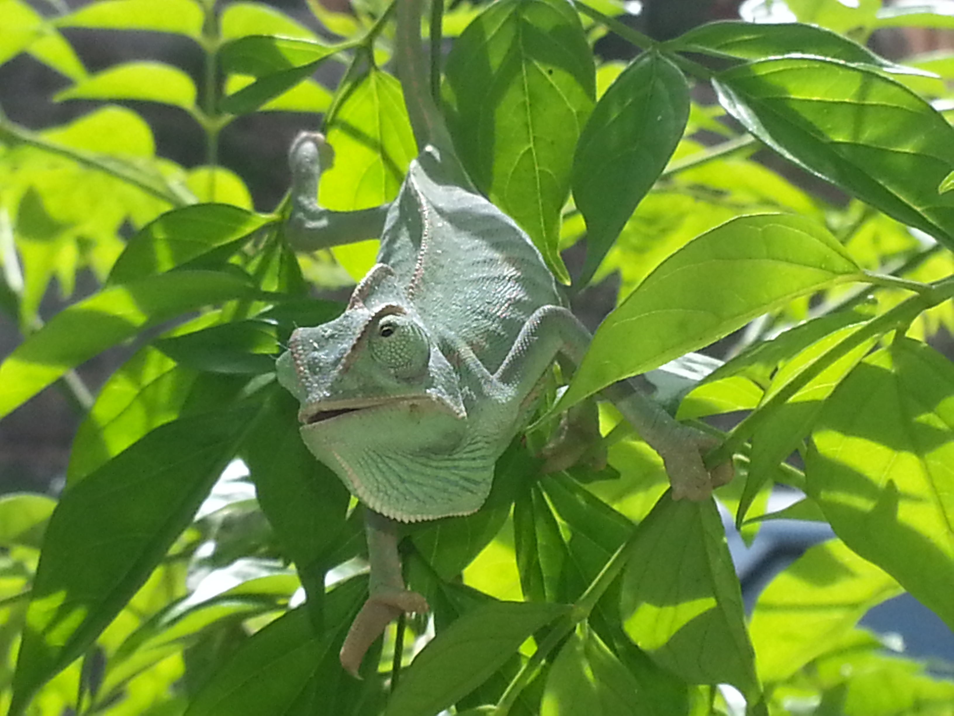 Camaleonte